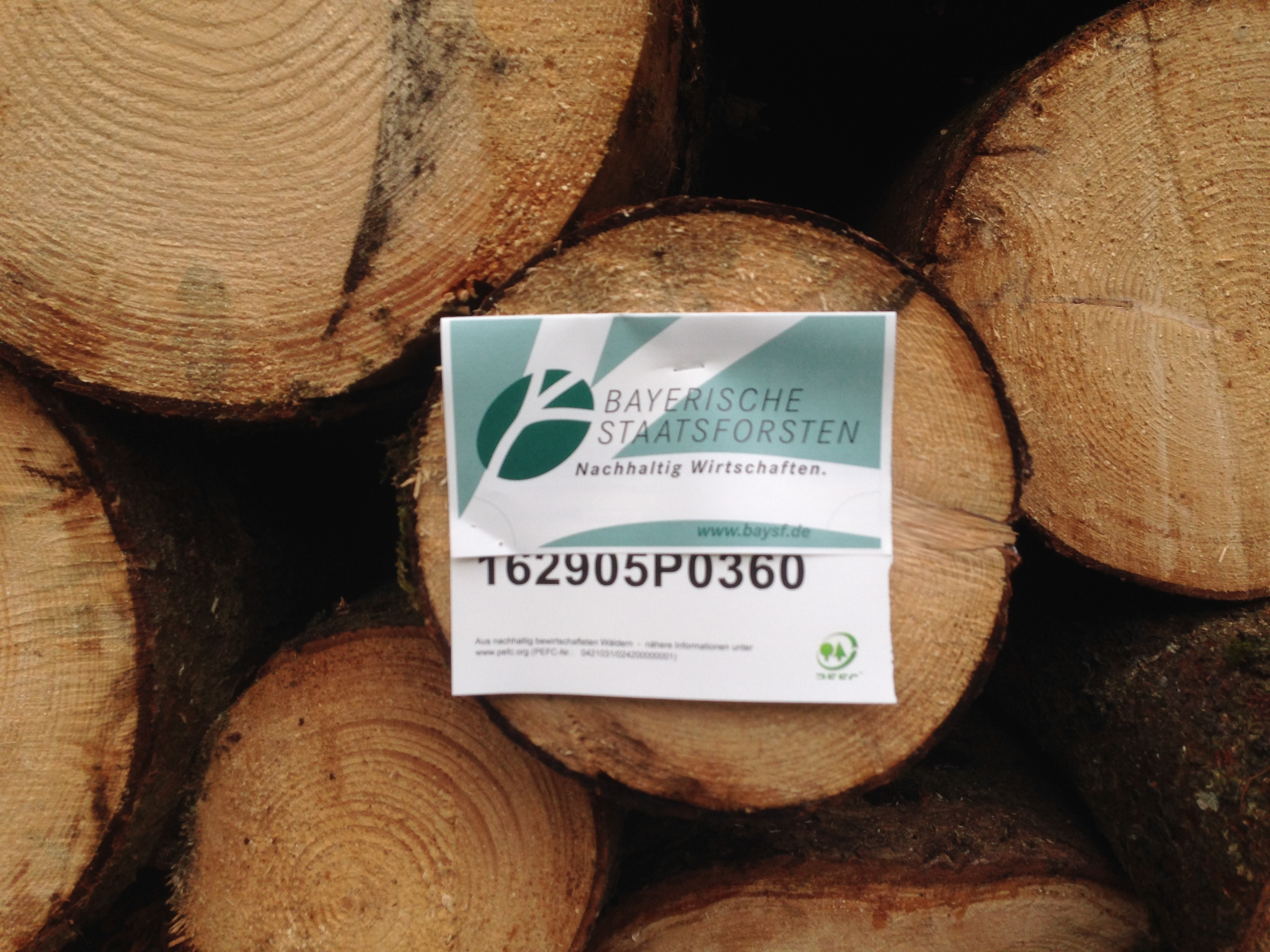 Holzpolter Zettel